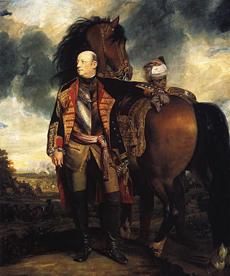 John Manners, Marquess of Granby in der Uniform der „Blues“ nach dem Siebenjährigen Krieg